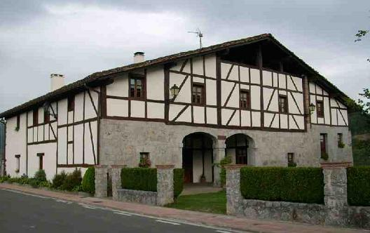 Etxeberri baserria (Altzo, Gipuzkoa) gauregun